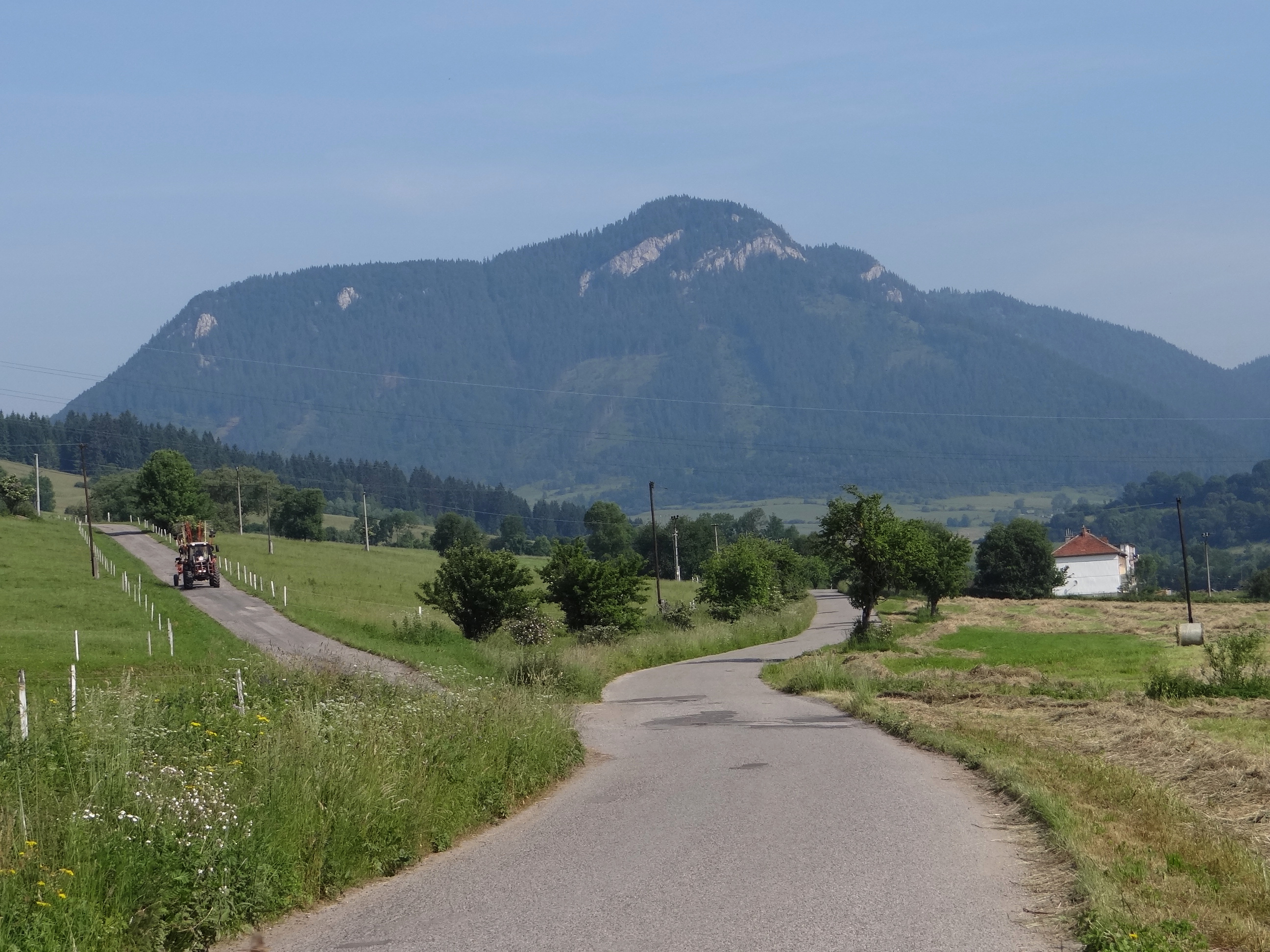 Widok z szosy do Bukoviny